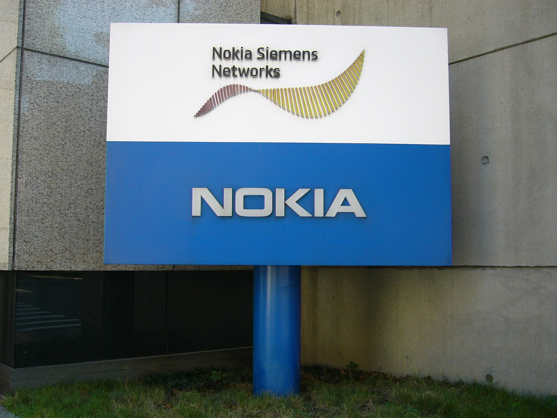 中文（台灣）: 臺北市松山區民生東路三段100號漢德民生大樓外，台灣諾基亞西門子通信總部招牌。